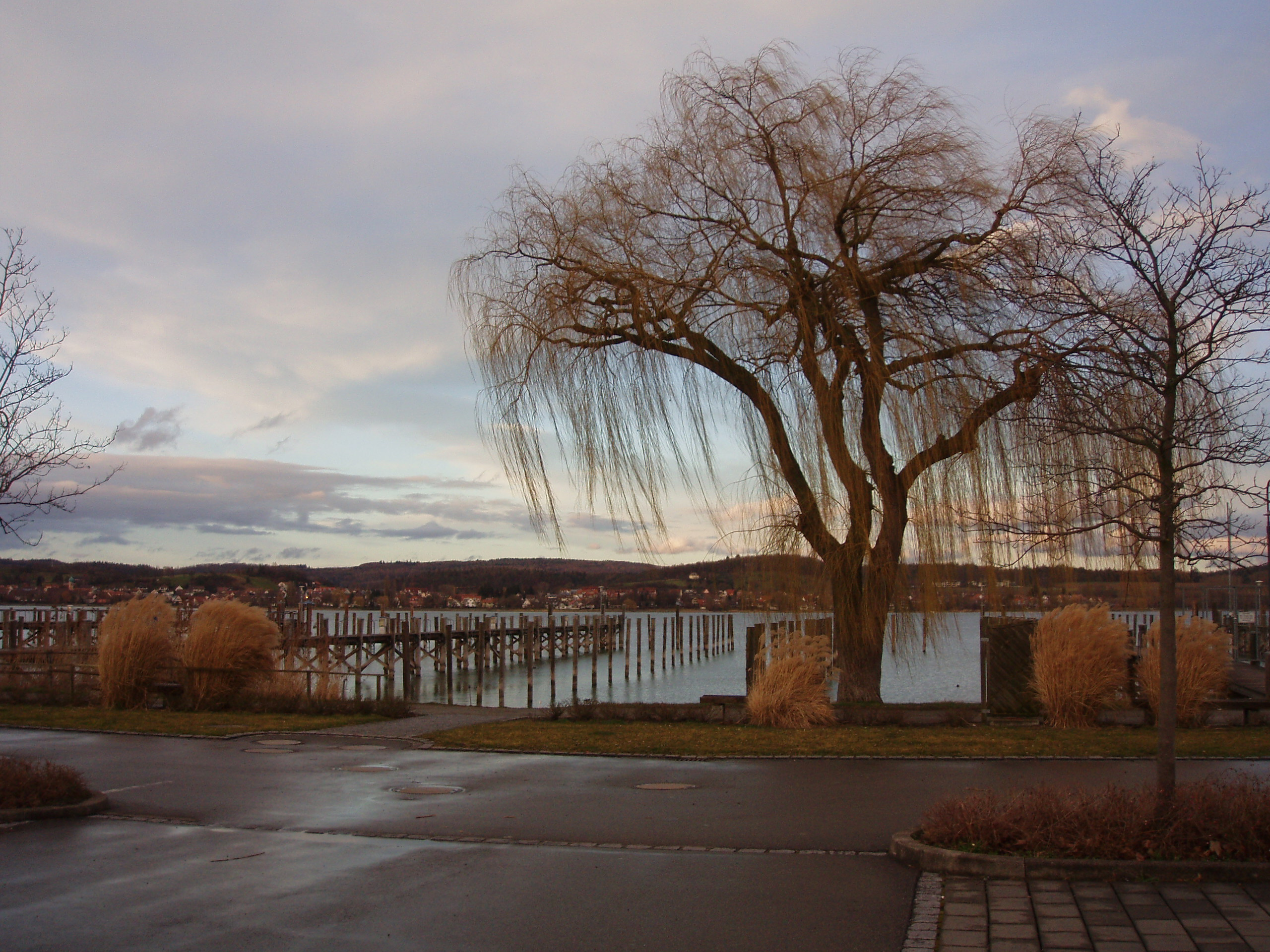 Reichenau, Hafen